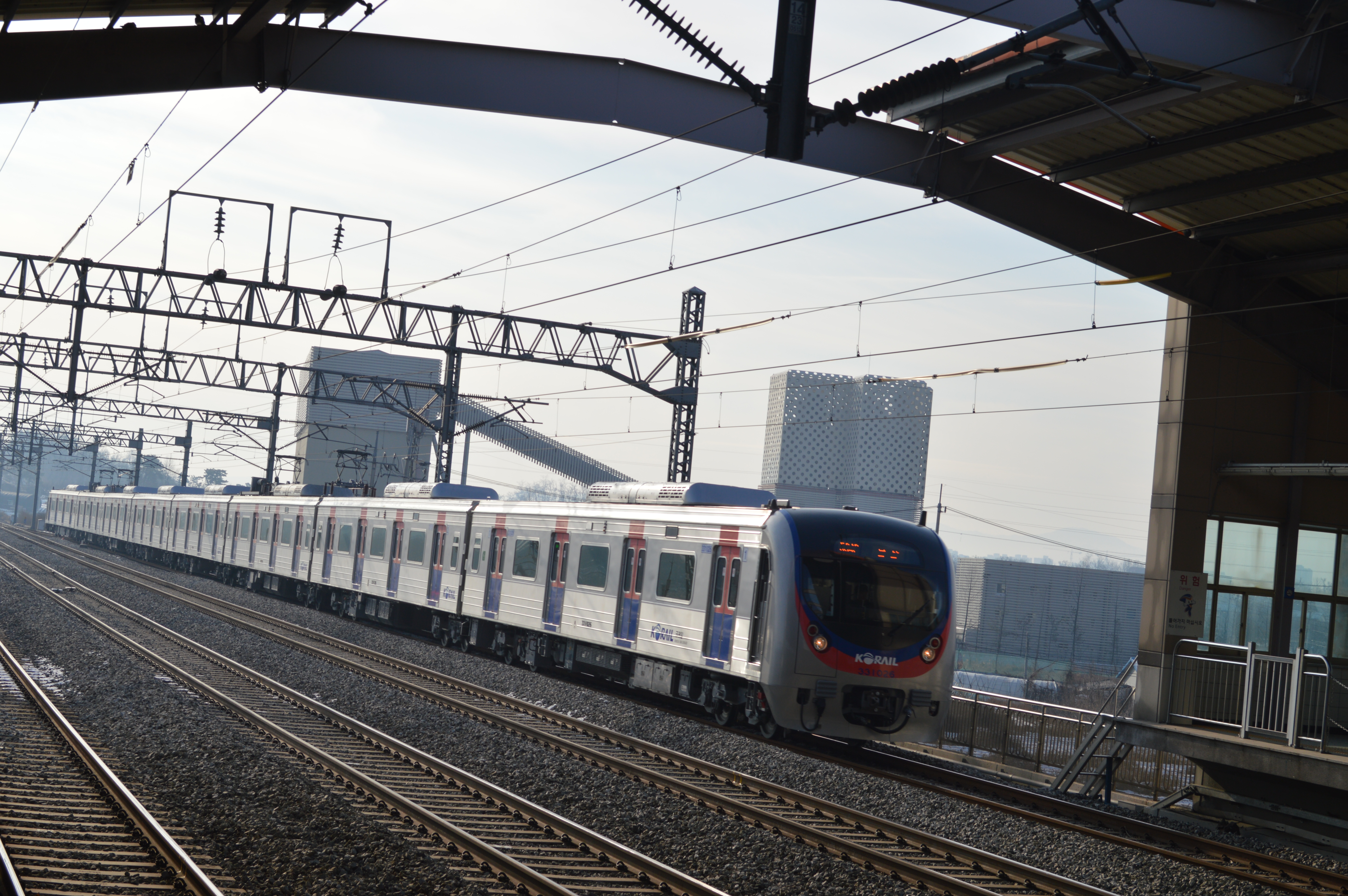 양정역 진입 중인 33126편성